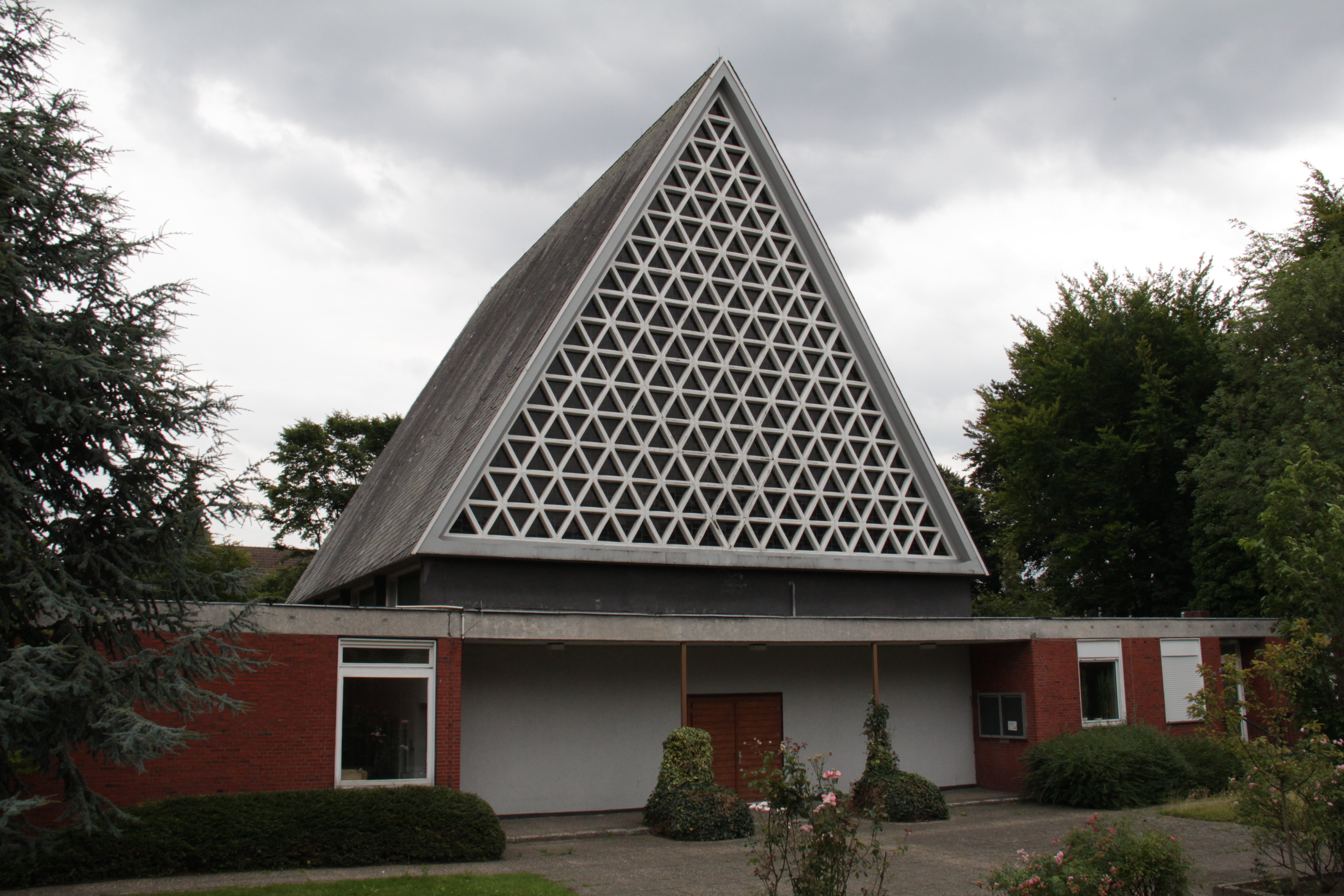 Versöhnungskirche in Münster, 2007 profaniert